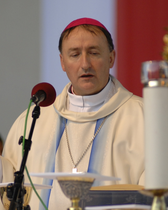 Andrzej Jeż - biskup tarnowski